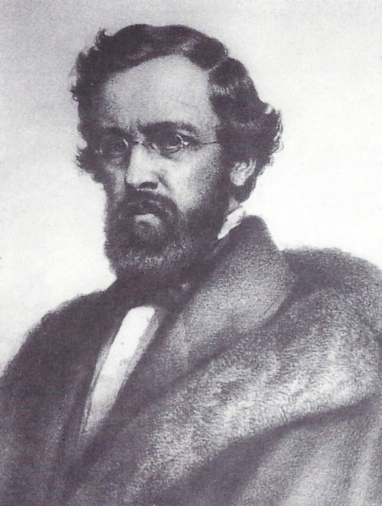 Fotograische Kopie eines Gemäldes des Schweizer Werkzeugmachers (Orthopäden) Johannes Wildberger (1815–1879)